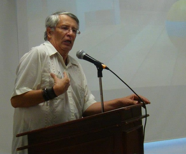 Gobernador